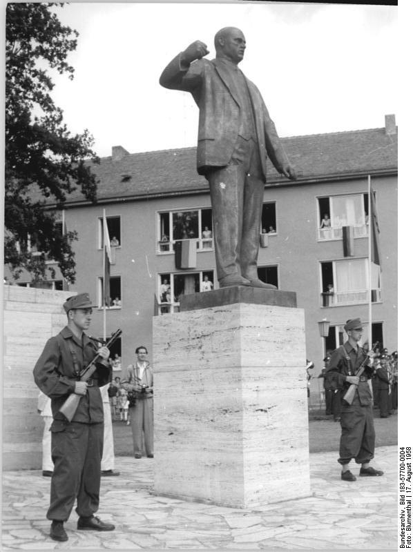 Weimar, Ernst Thälmann-Denkmal Zentralbild Blumenthal Ms-Ko. 17.8.1958 ADN Thälmann-Denkmal in Weimar eingeweiht Zu seinem Höhepunkt in der Vorbereitung der Einweihung der Mahn- und Gedenkstätte Buchenwald am 14. September und zu einer leidenschaftlichen Kampfansage gegen Faschismus und Krieg wurde die Enthüllugn des Ernst-Thälmann-Denkmals auf dem "Platz der 56 000!, am 17. August in Weimar. An dem feierlichen Akt nahmen mehrere tausend Werktätige sowie Generale der Sowjetarmee und der Nationalen Streitkräfte teil. UBz:Das Thälmann-Denkmal nach der Enthülllung